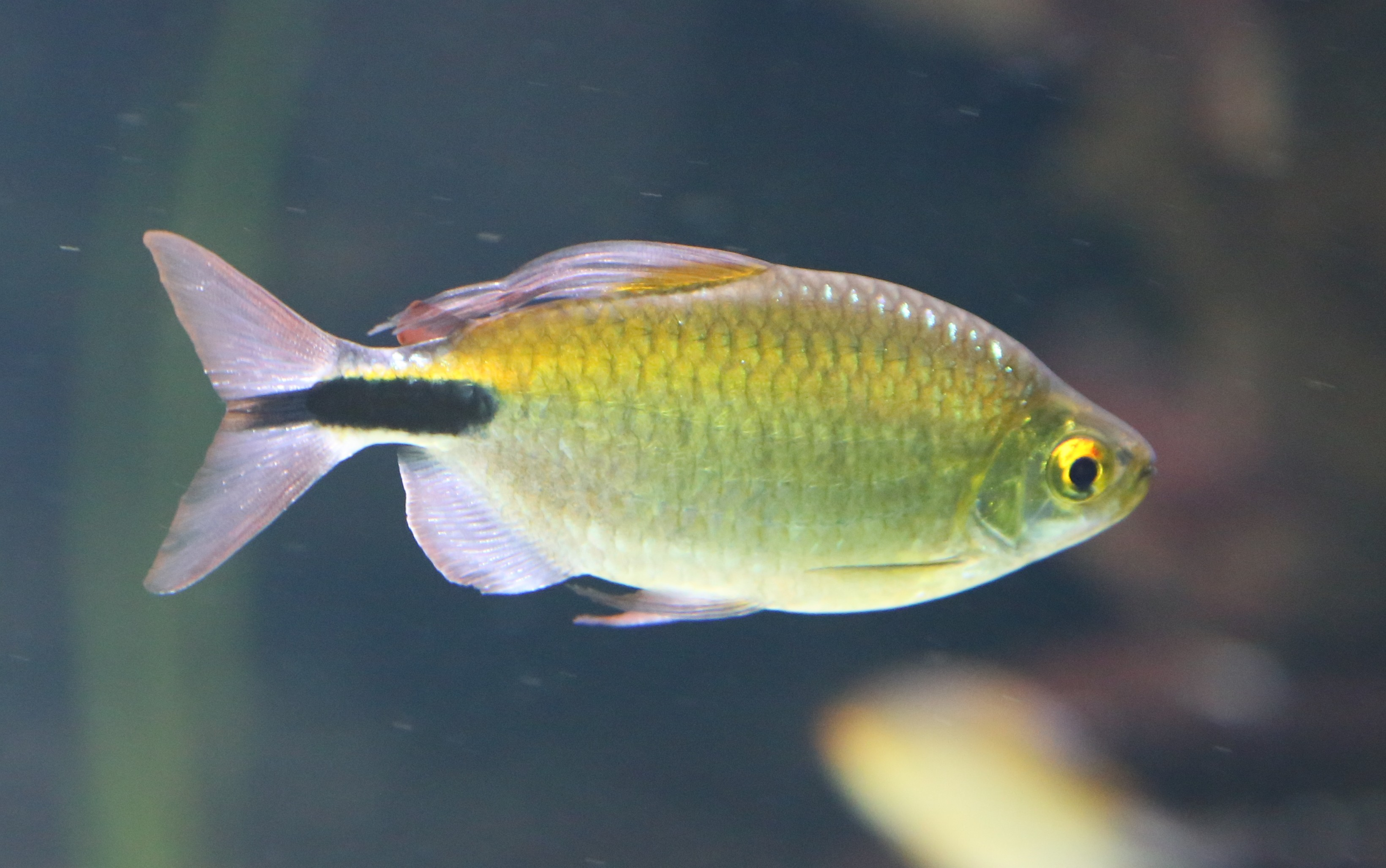 Langflossensalmler (Brycinus longipinnis), Tierpark Hellabrunn, München